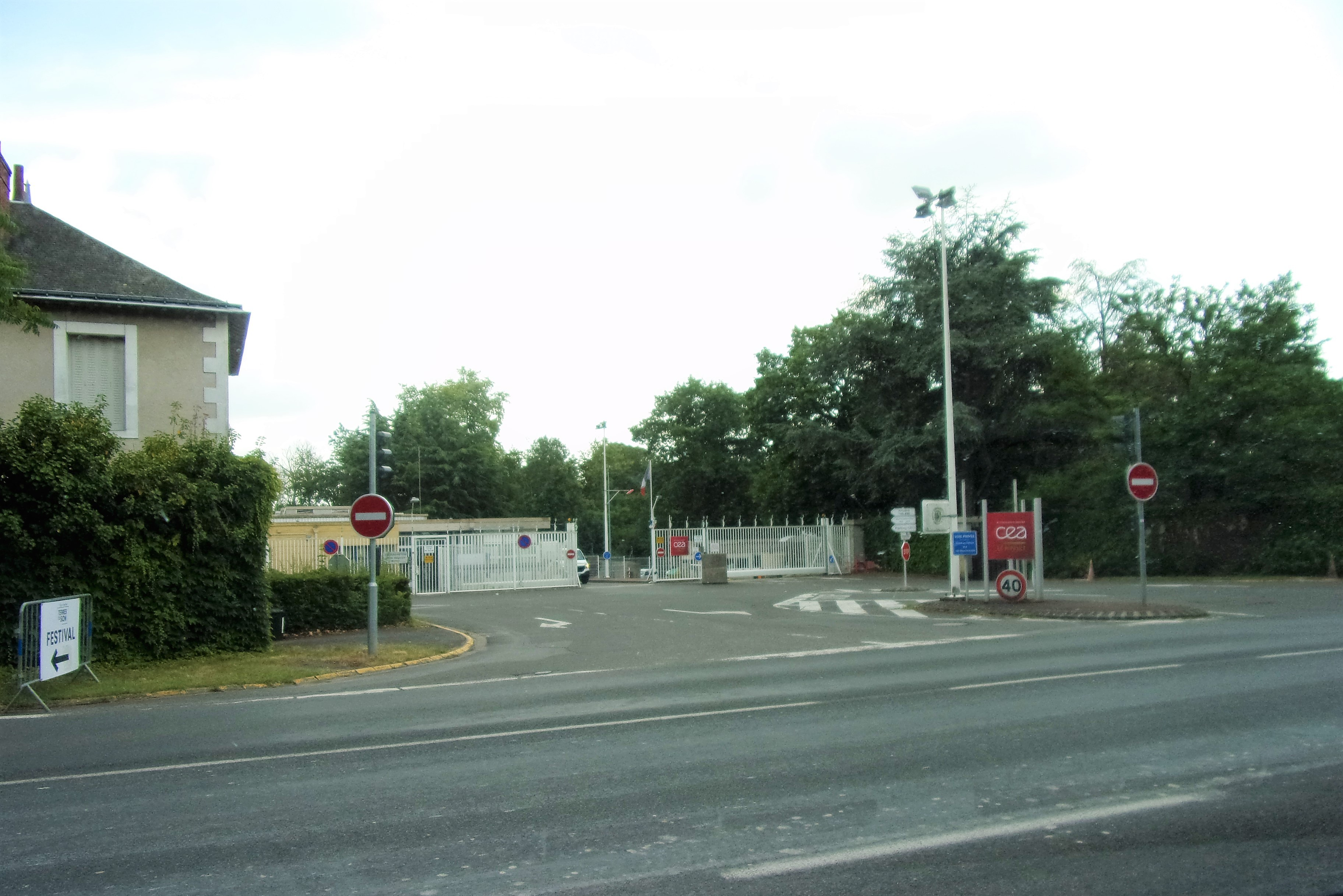 Entrée du CEA du Ripault àMonts